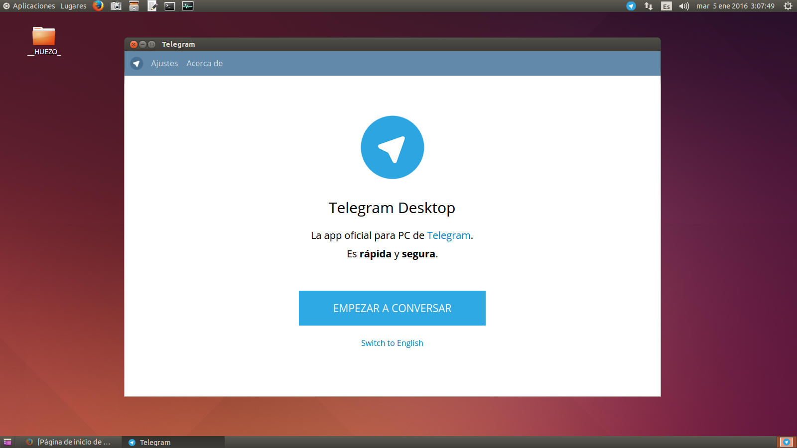 Telegram Desktop v 0.9.17 en Ubuntu 14.04